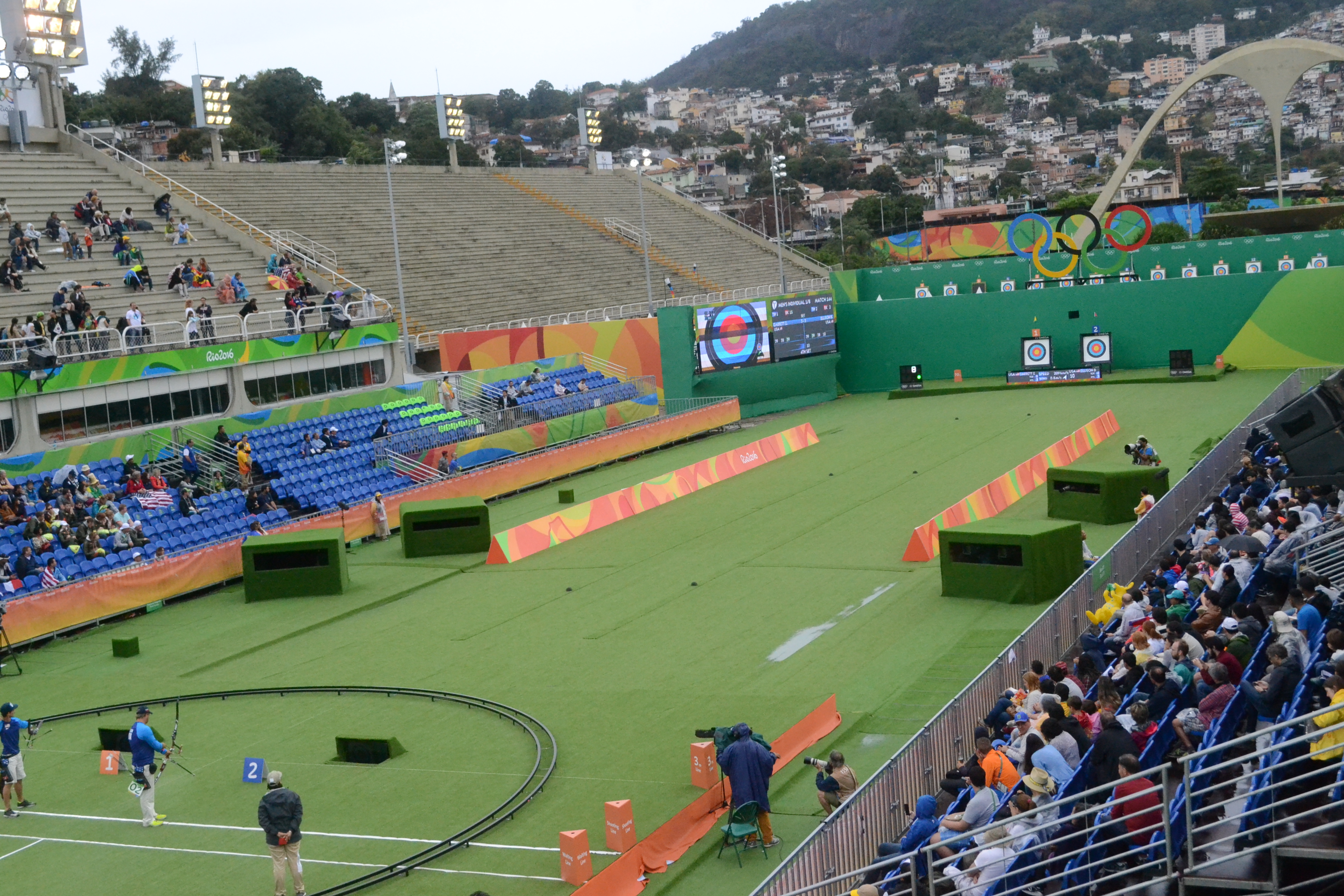 O setor do sambódromo como cenario